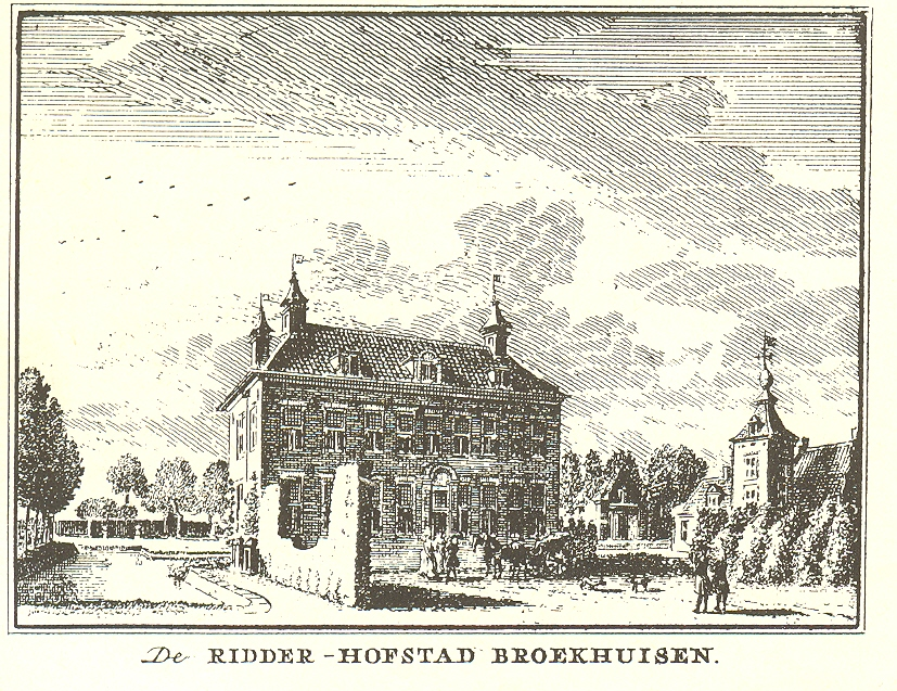 De Ridder-Hofstad Broekhuisen. Kopergravure van Hendrik Spilman naar Jan de Beijer uit Het verheerlykt Nederland.